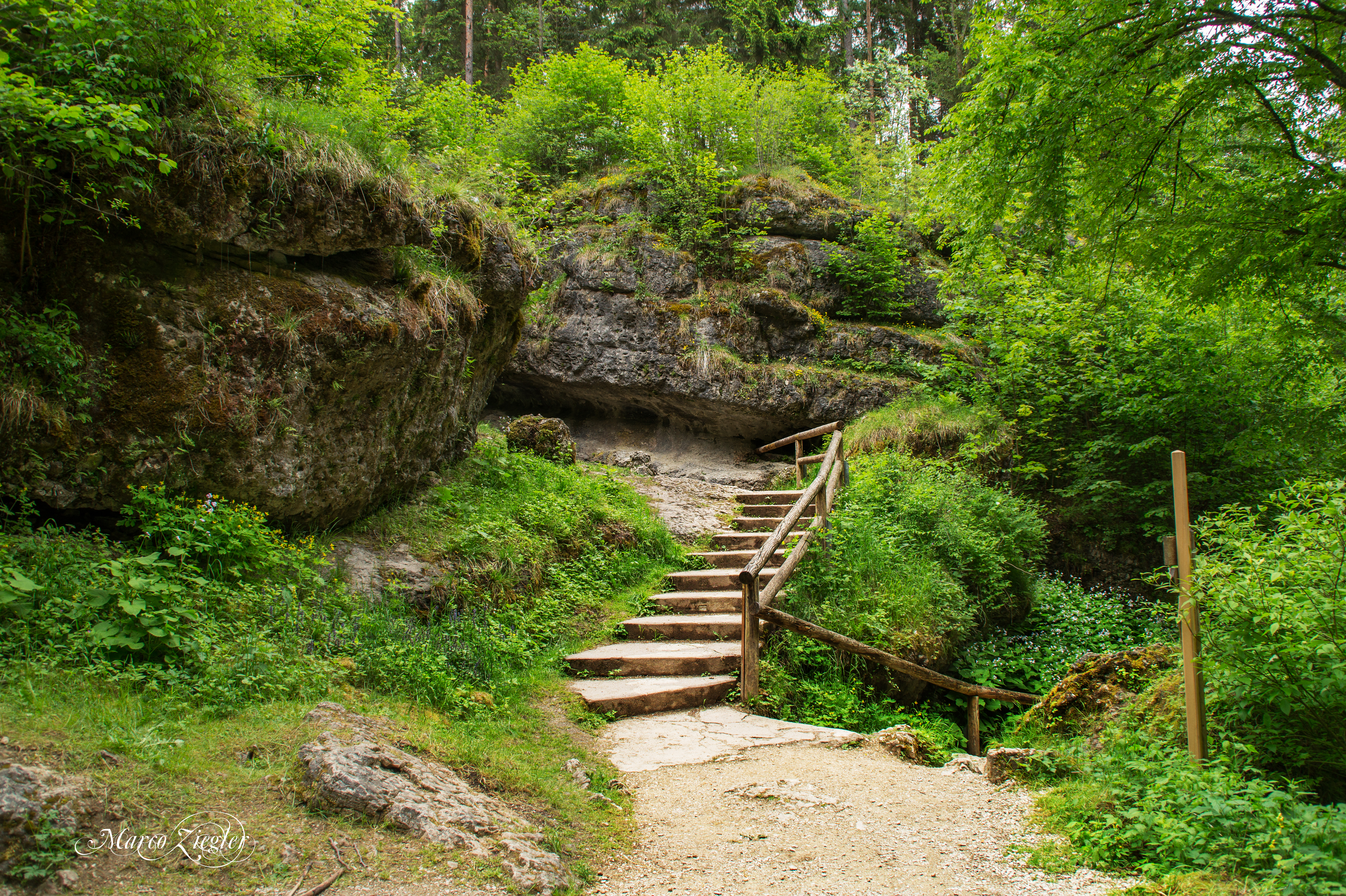 Wanderweg um die Teufelshöhle bei Pottenstein.